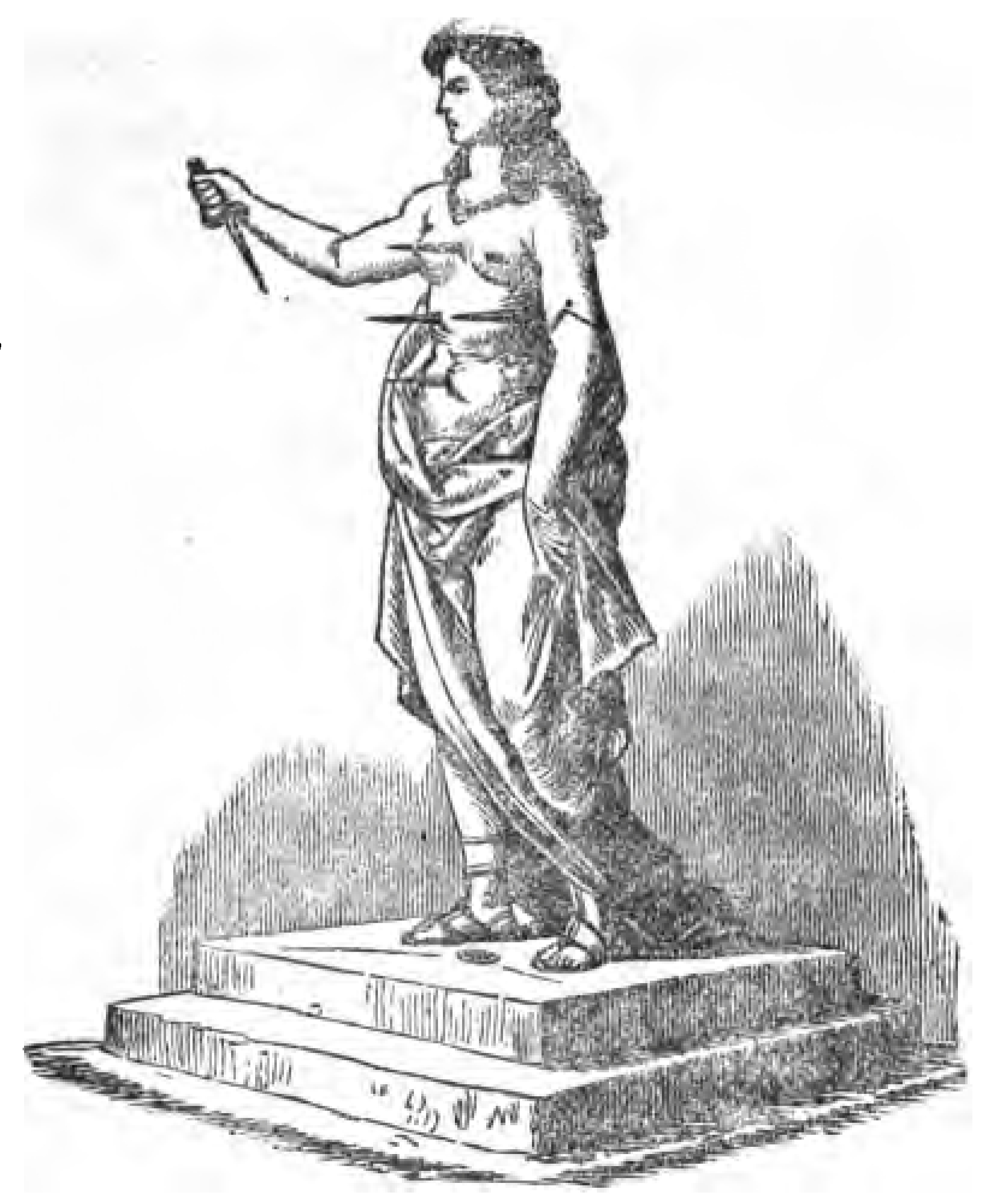 Bildunterschrift: Die eiserne Jungfrau auf Schloß Cseithe im Waagthal